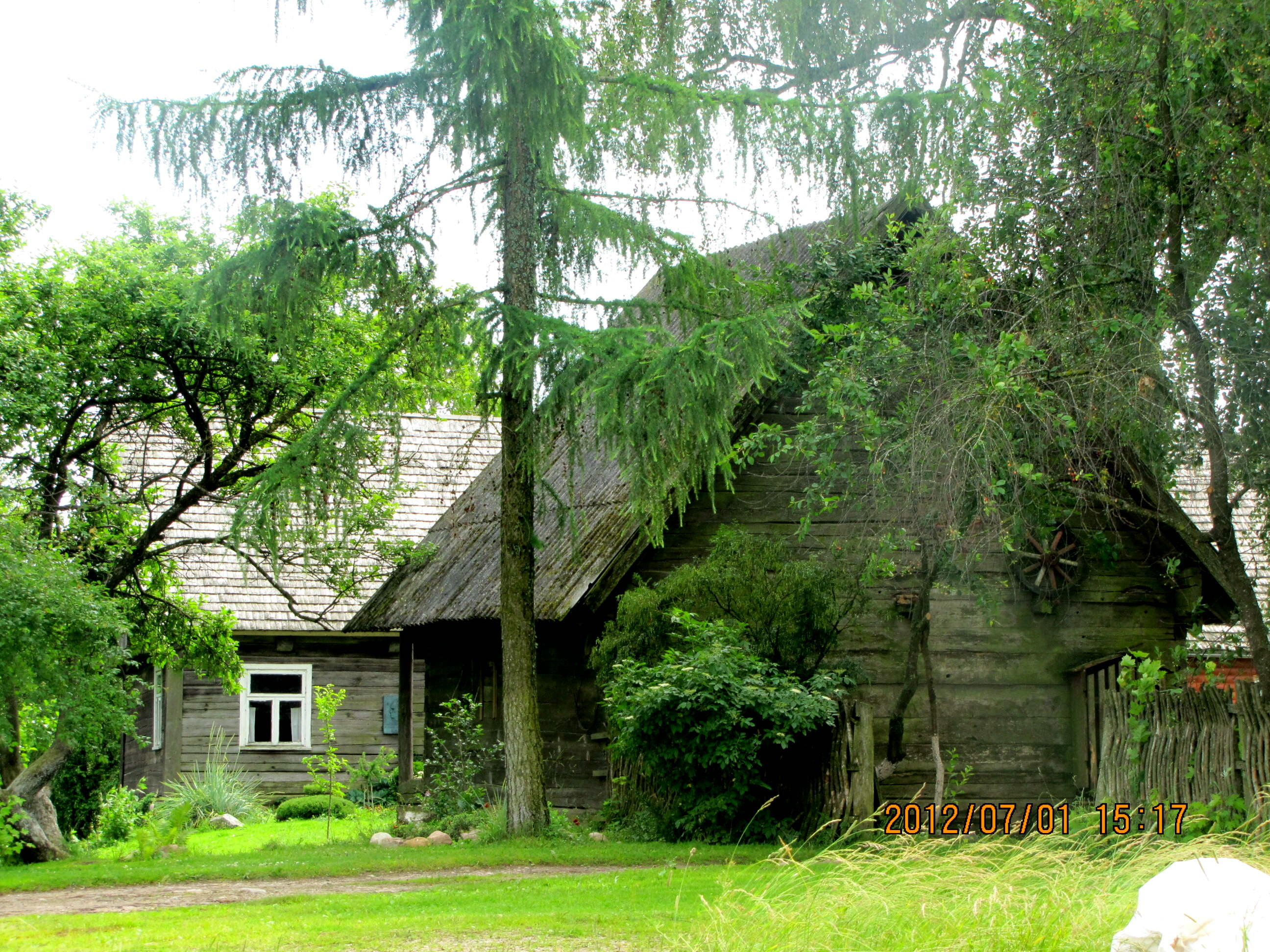 Nuotraukoje Vinco Mykolaičio - Putino tėviškės klėtelė ir gyvenamasis namas. (Fotografuota nuo Aušrakalnio). Nuotraukos autorius Vytautas Degutis.